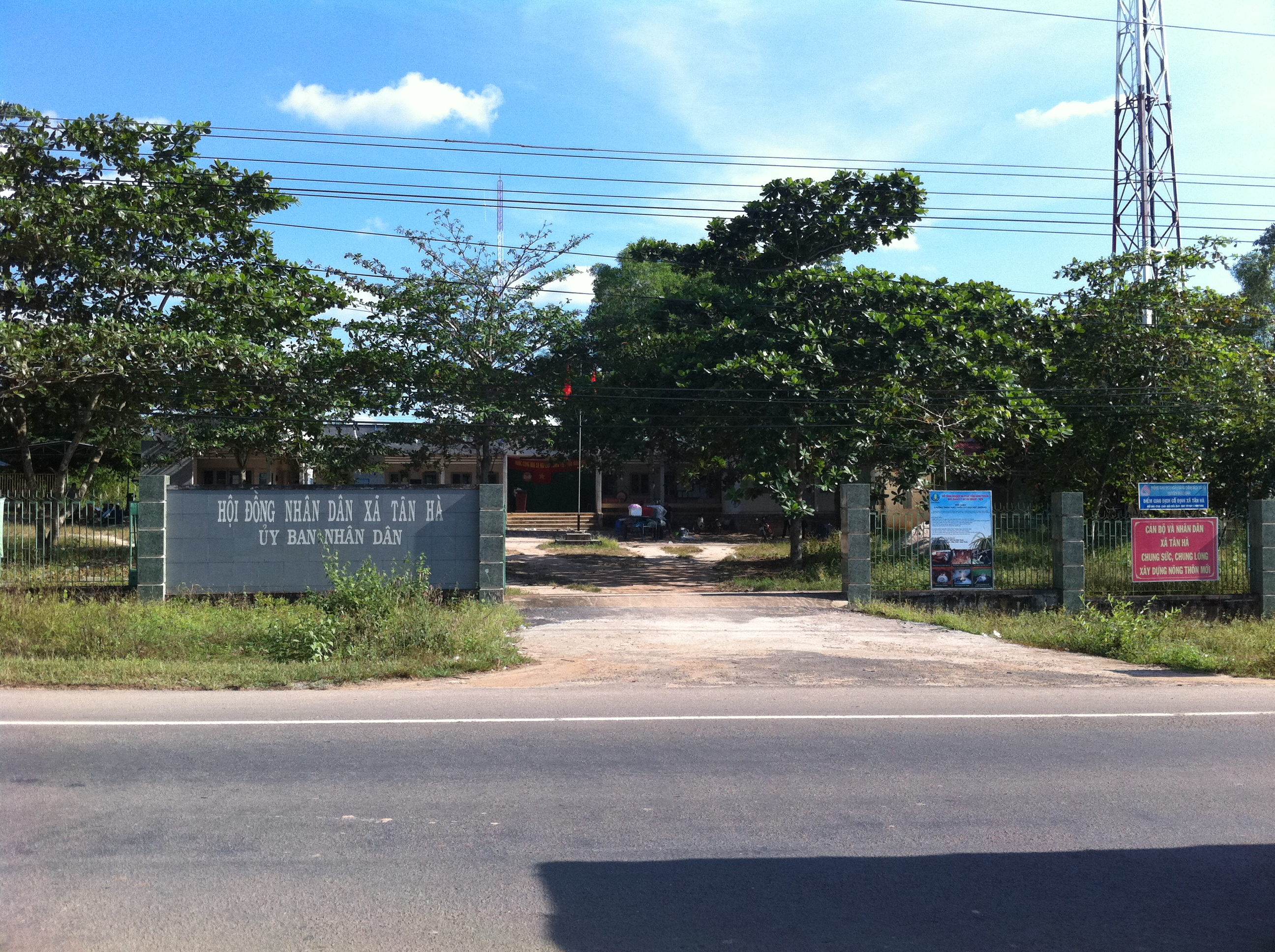 UBND xã Tân Hà, Đức Linh, Bình Thuận